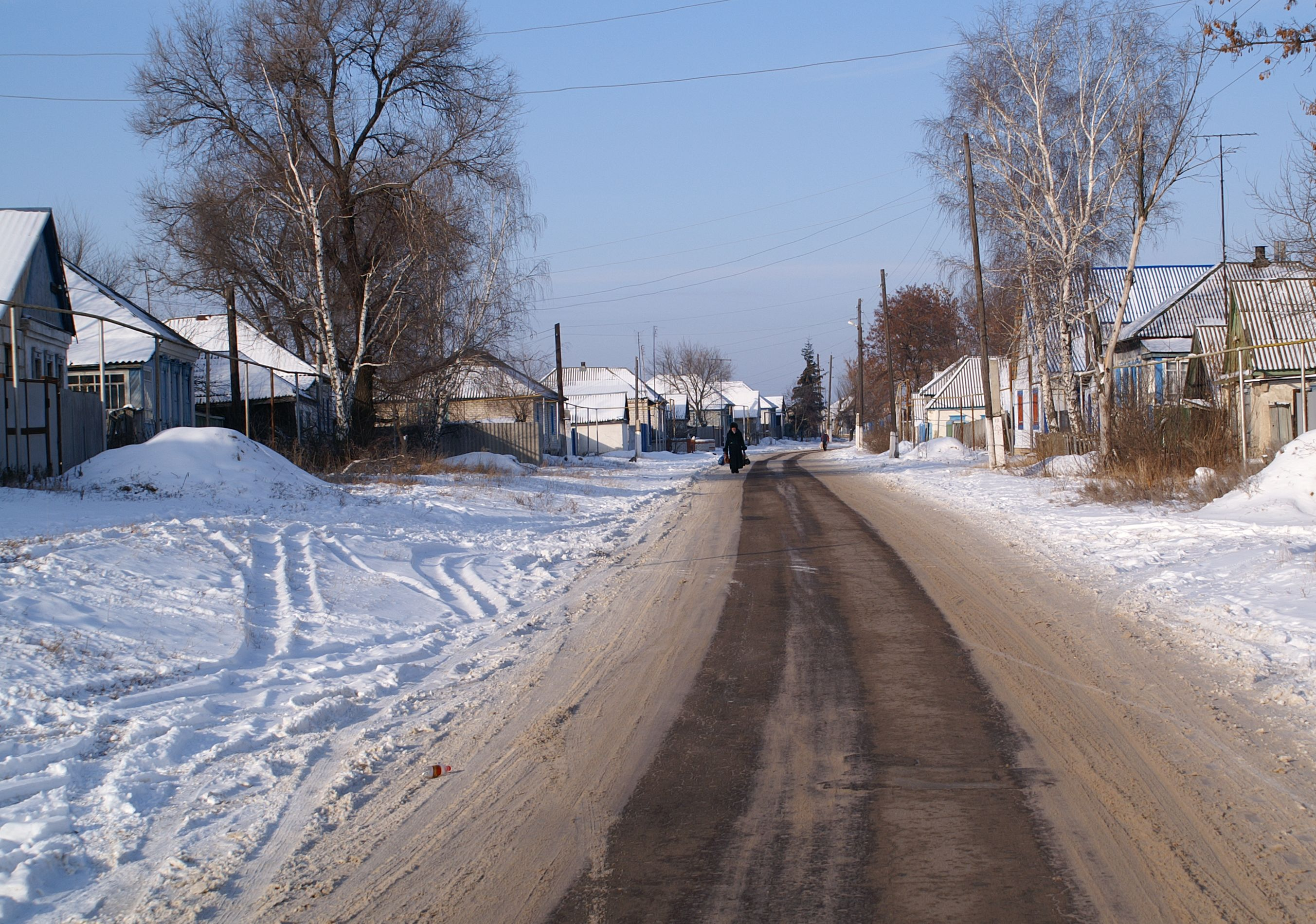 Улица в сл. Шапошниковке